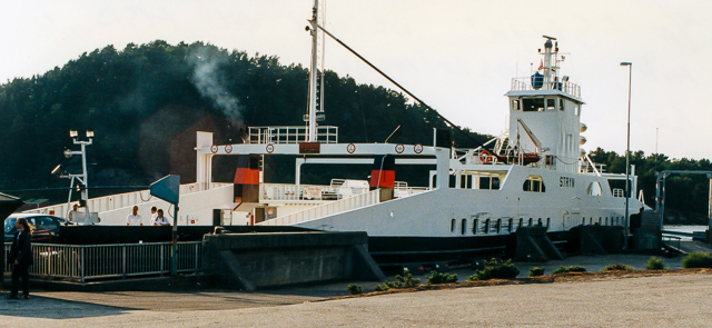 MS Stryn (tidligere MF Gloppen) ved Valevåg i Hordaland. Fergen var utleid til HSD når bildet ble tatt.